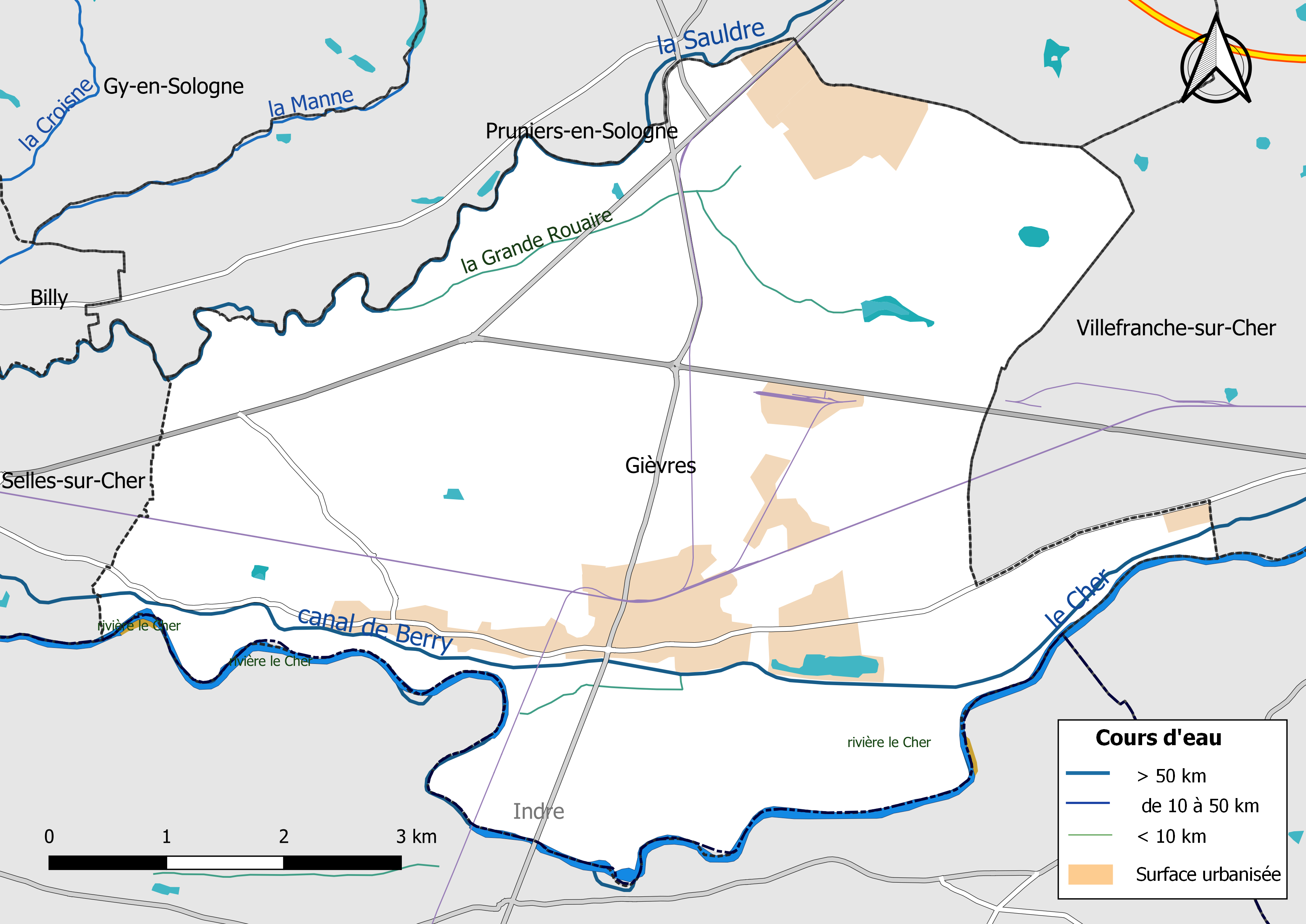 Carte du réseau hydrographique de la commune de Gièvres (Loir-et-Cher, France).